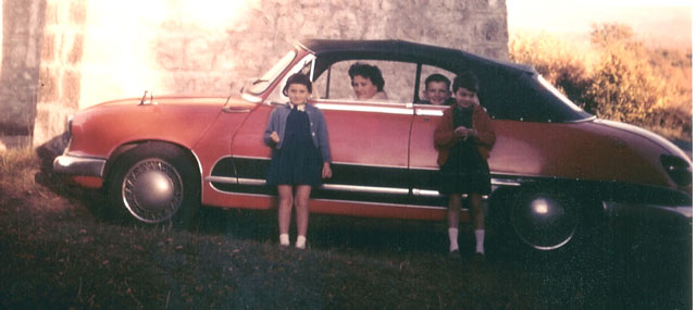 Photographie personnelle d'époque d'une Panhard Dyna Z Cabriolet. Licence